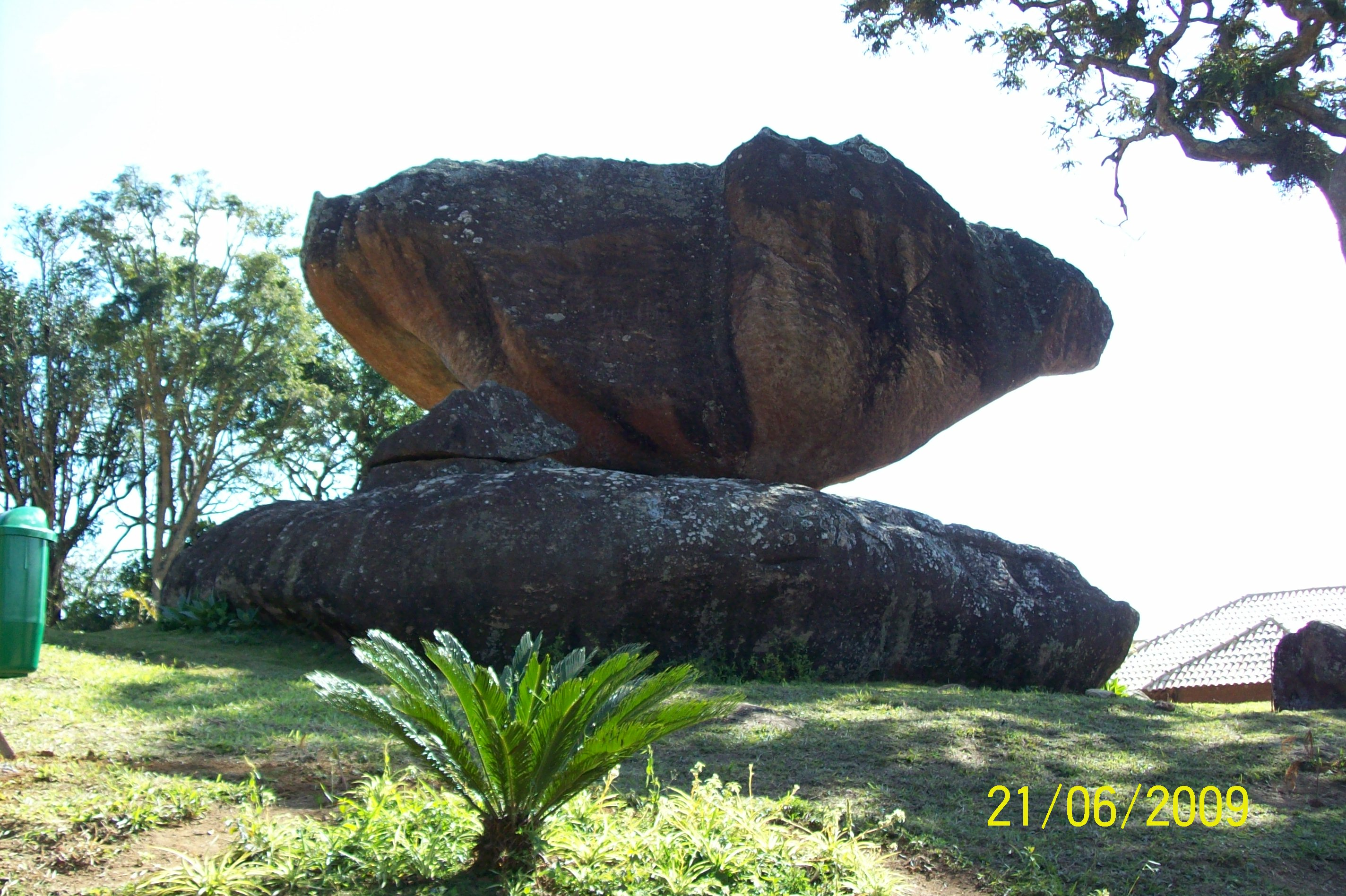 Pedra_do_Navio_Frente